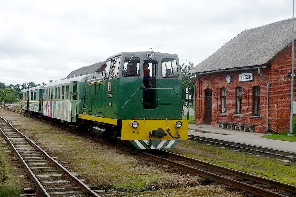 Тепловоз ТУ7-2994 с пассажирским поездом на станции Алуксне (Латвия)